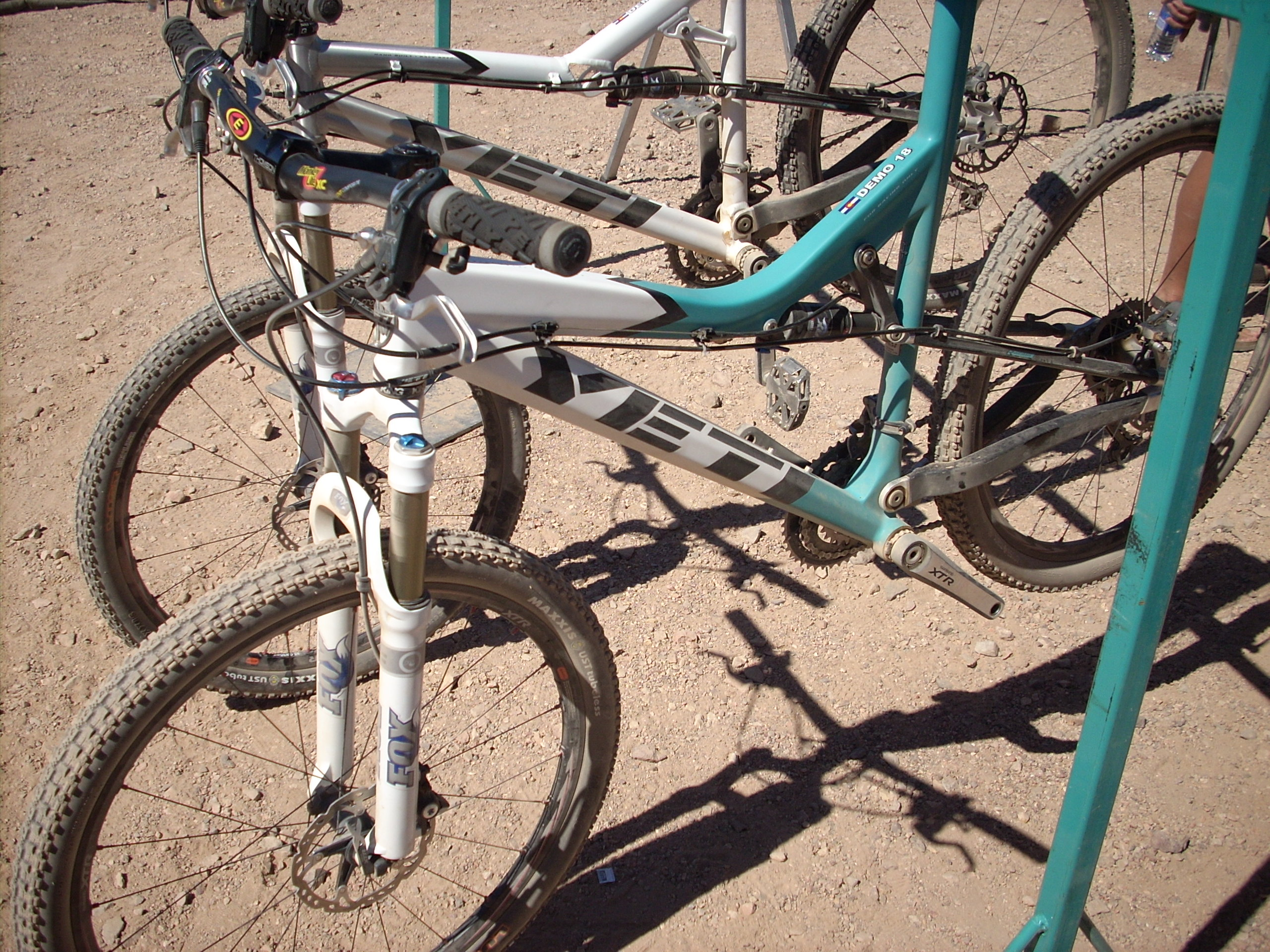 Yeti ASR Carbon